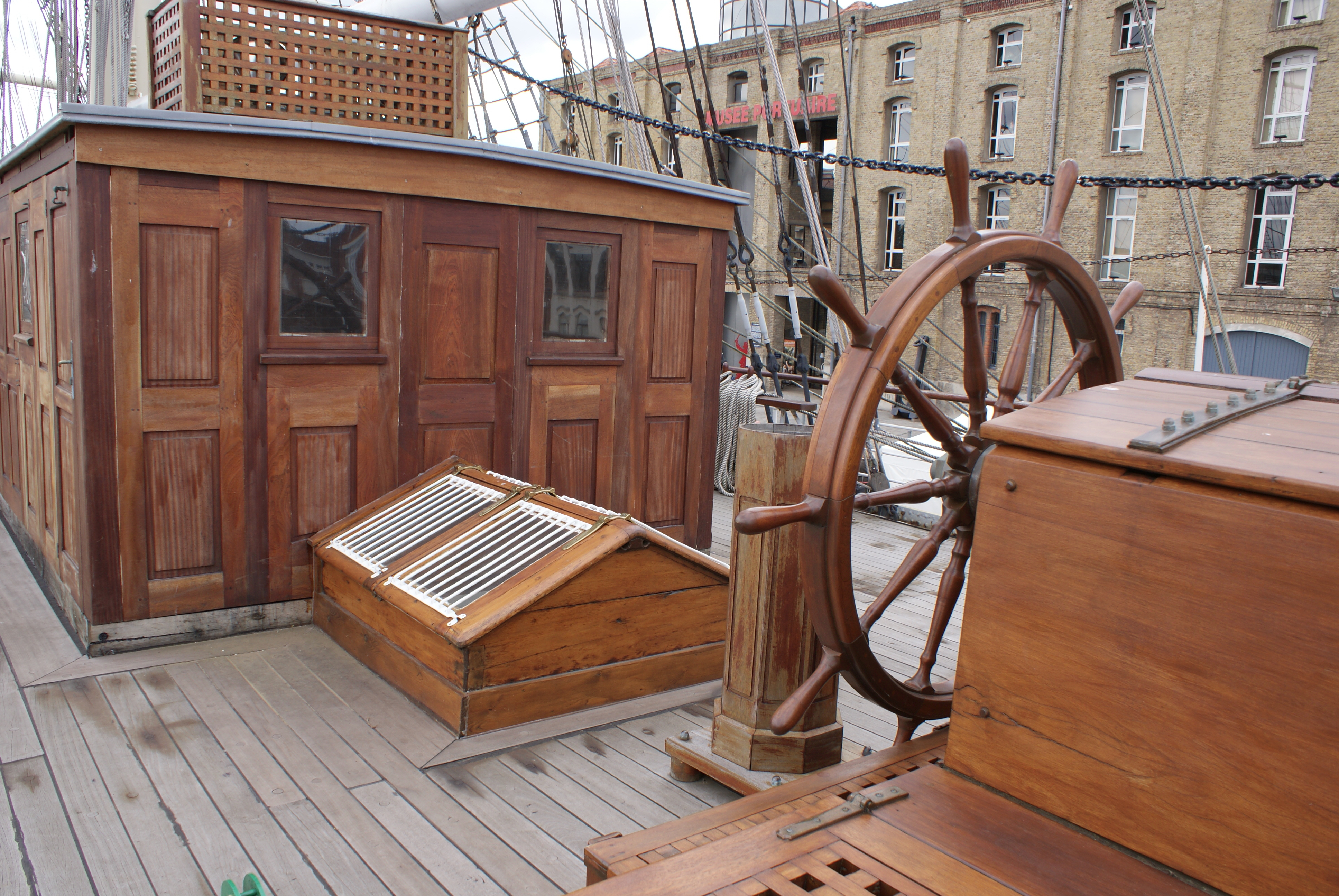 Nouvelle salle des carte (ou de navigation) du trois-mâts carré Duchesse Anne installée en 2010 (Musée portuaire de Dunkerque, Nord, France).